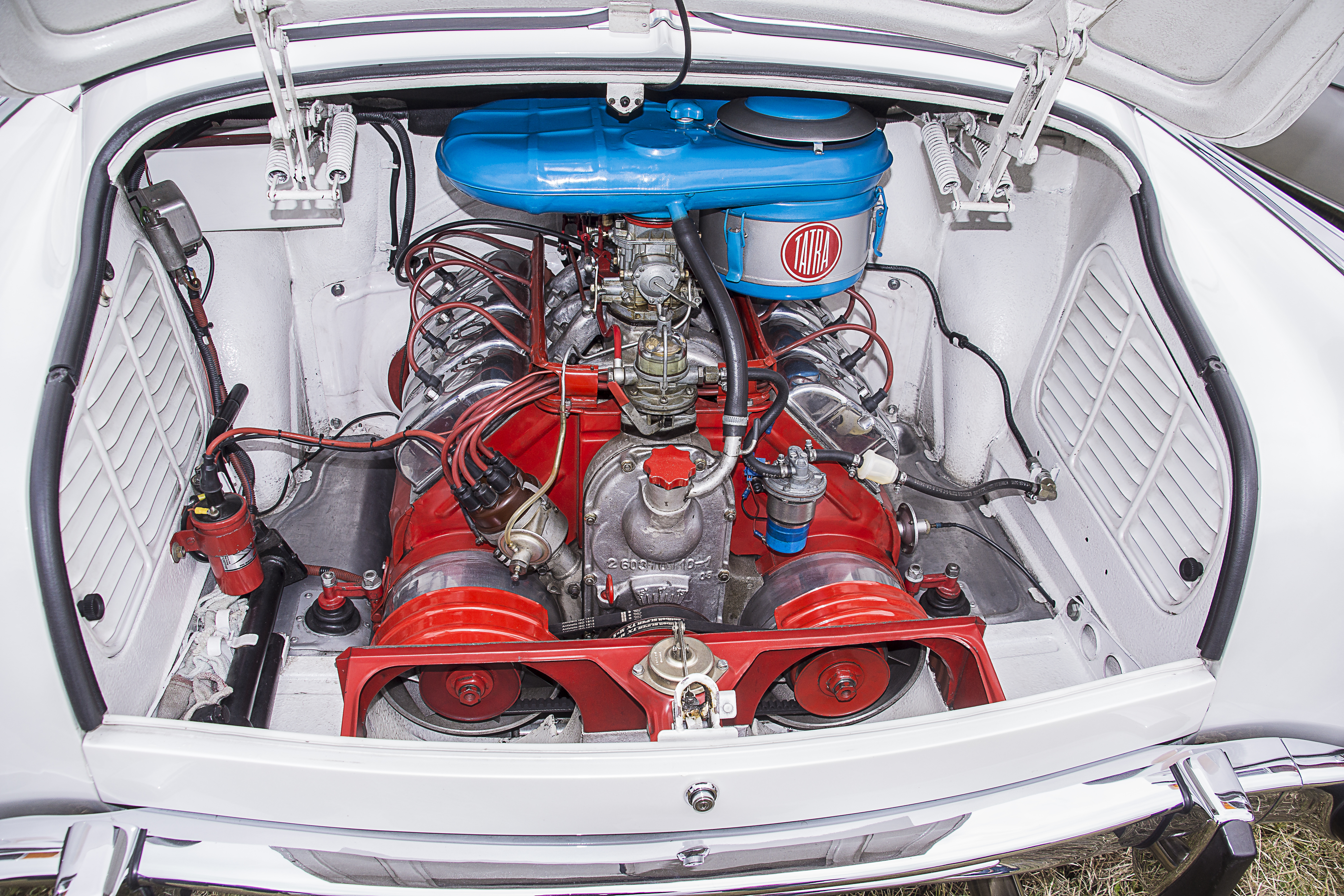 Luftgekühlter V8 Motor des Tatra 603-2 Bj.1969 Hubraum: 2472 cm³ Leistung: 77 kW (105 PS) bei 4800 U/min